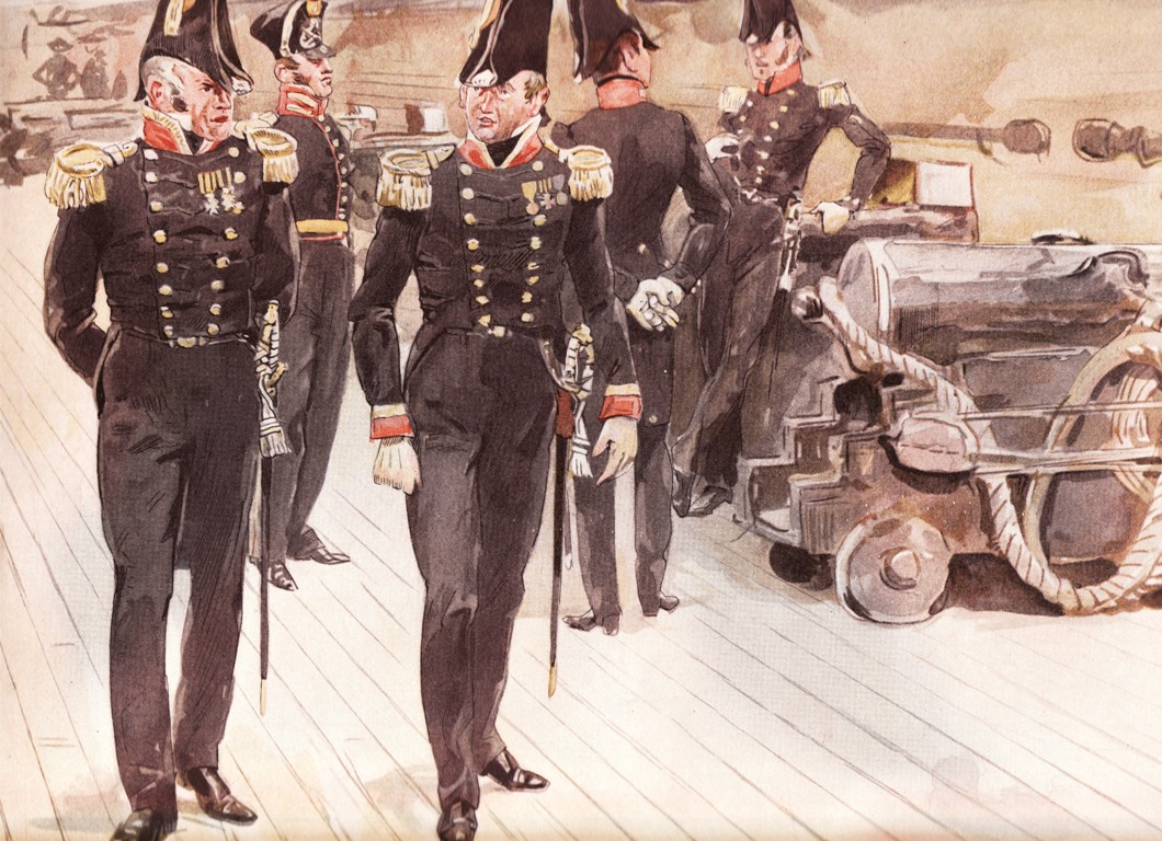 Zeeofficieren